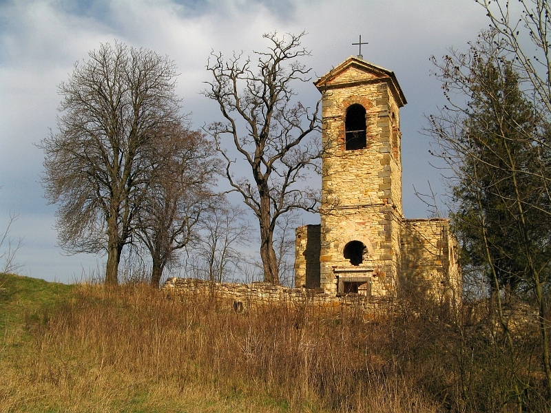 Kaple sv. Václava (Encovany), Prachova, Encovany, Encovany.